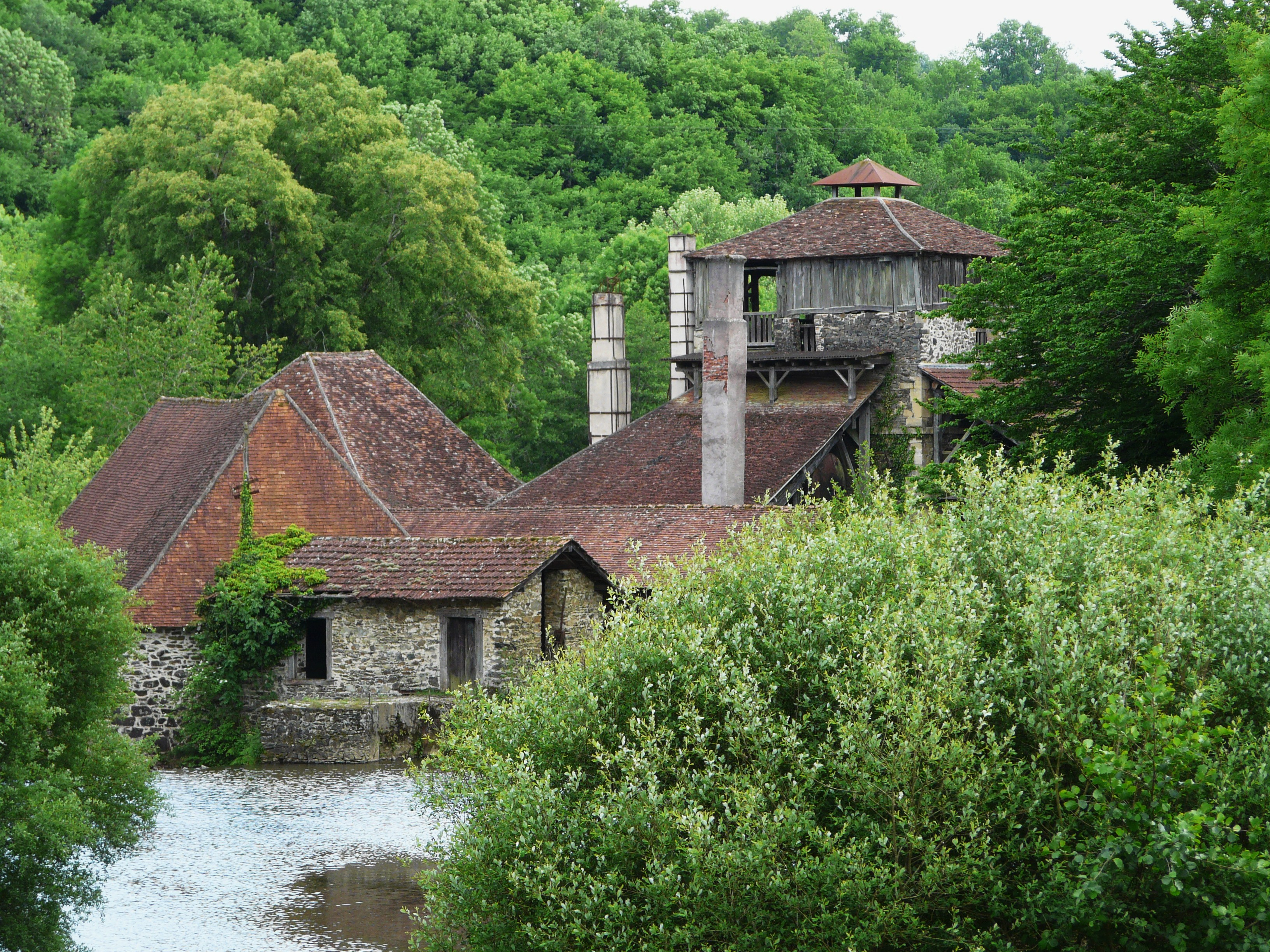 La forge de Savignac-Lédrier, Dordogne, France.